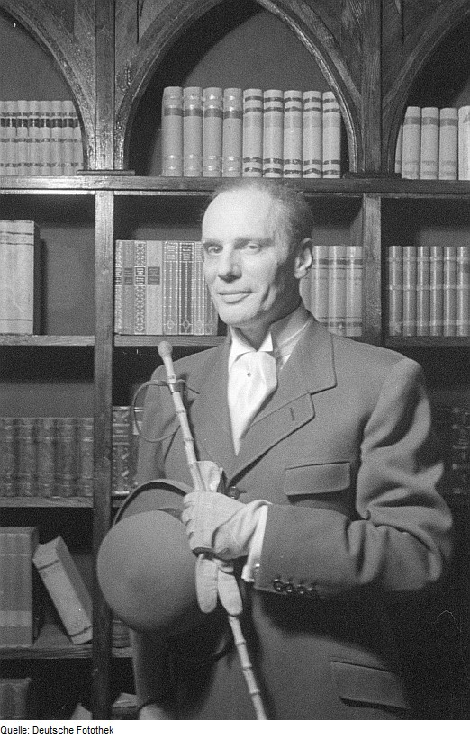 Original image description from the Deutsche FotothekSzenenbilder